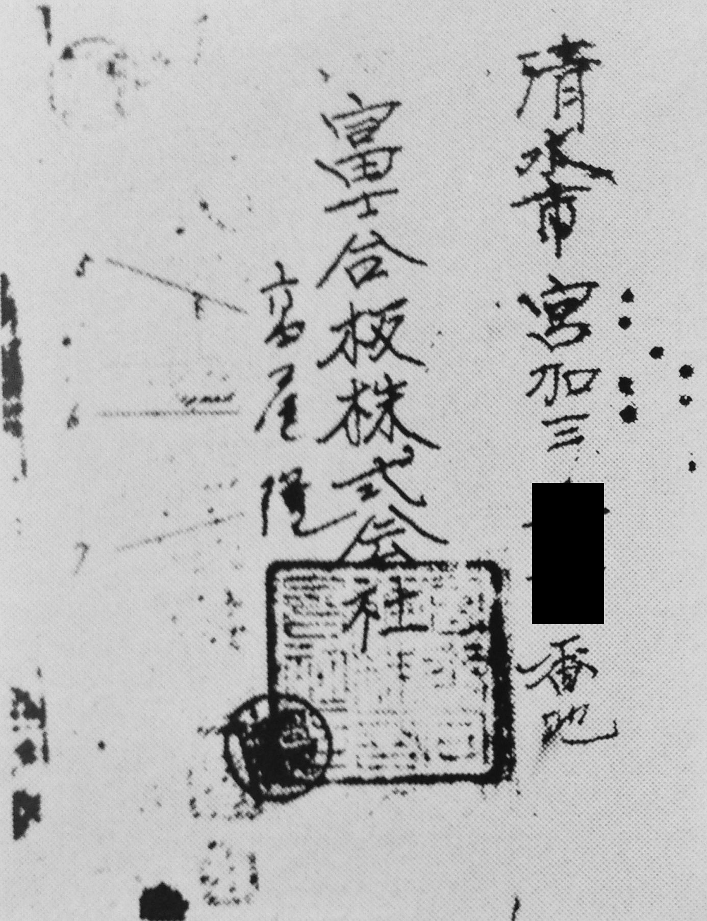 清水局事件における小切手の裏書